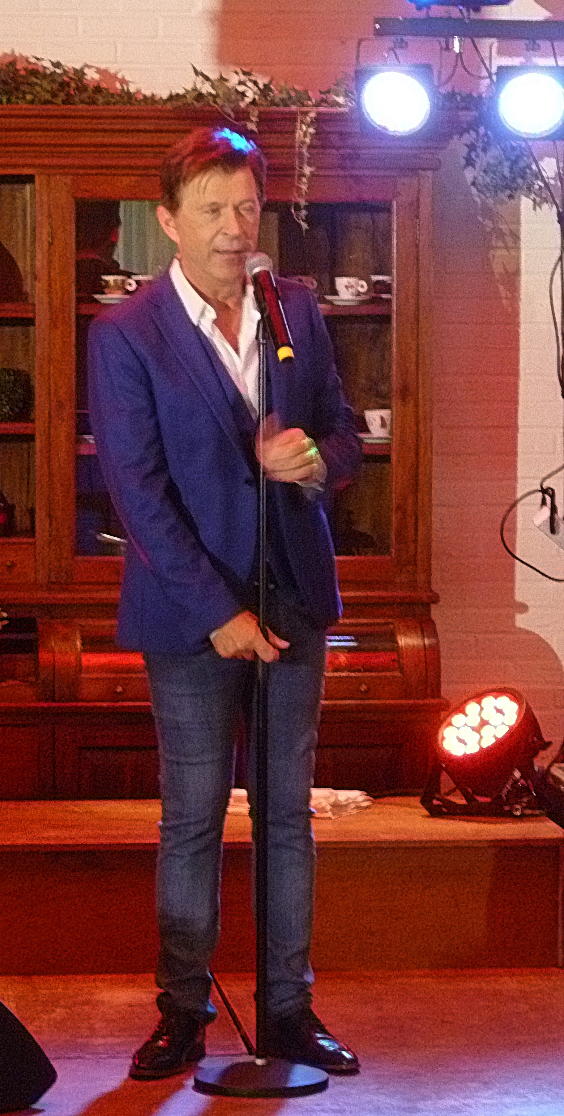 Jo Vally tijdens een concert in 2017